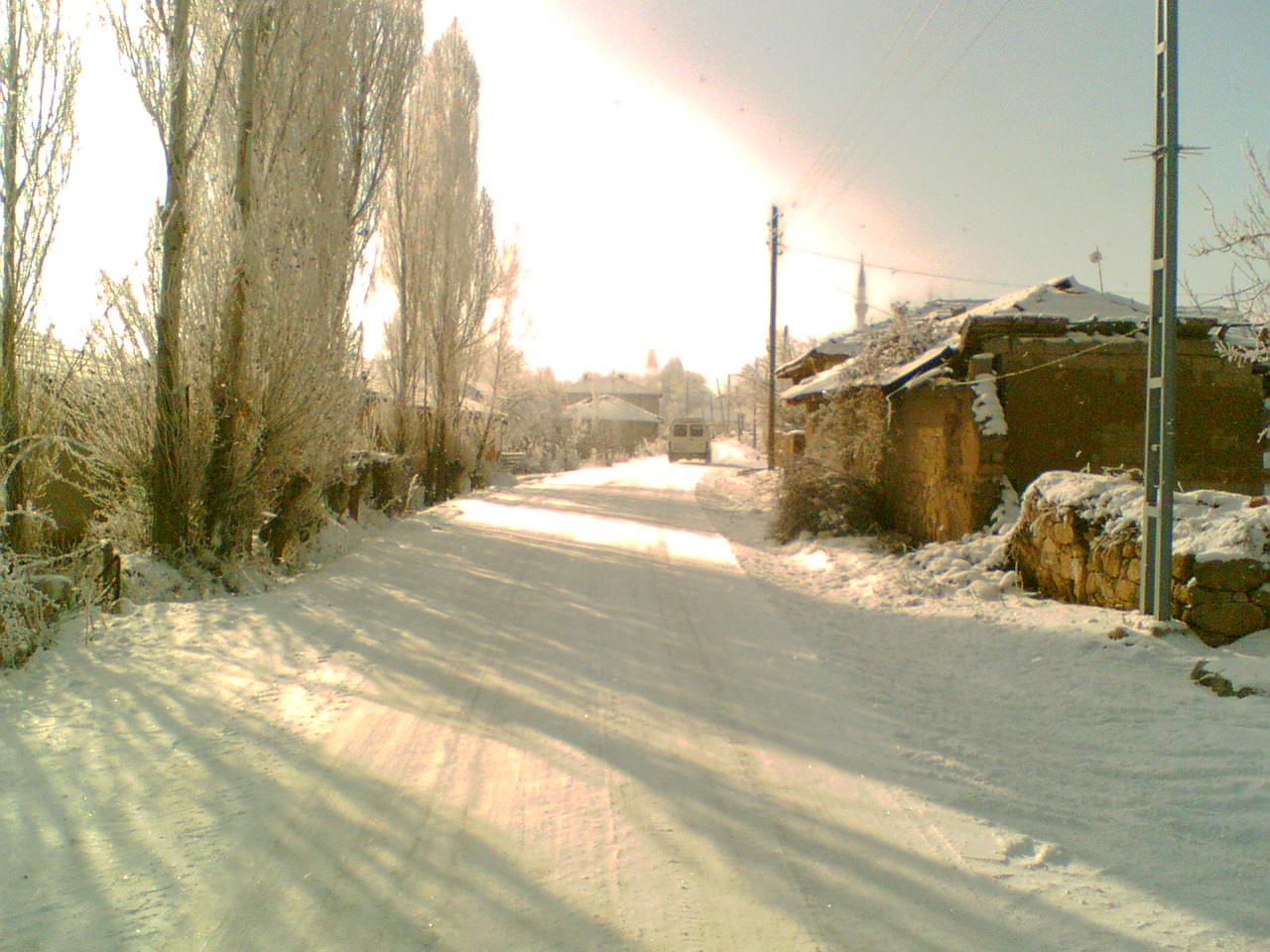 Ayrıdam, Sorgun